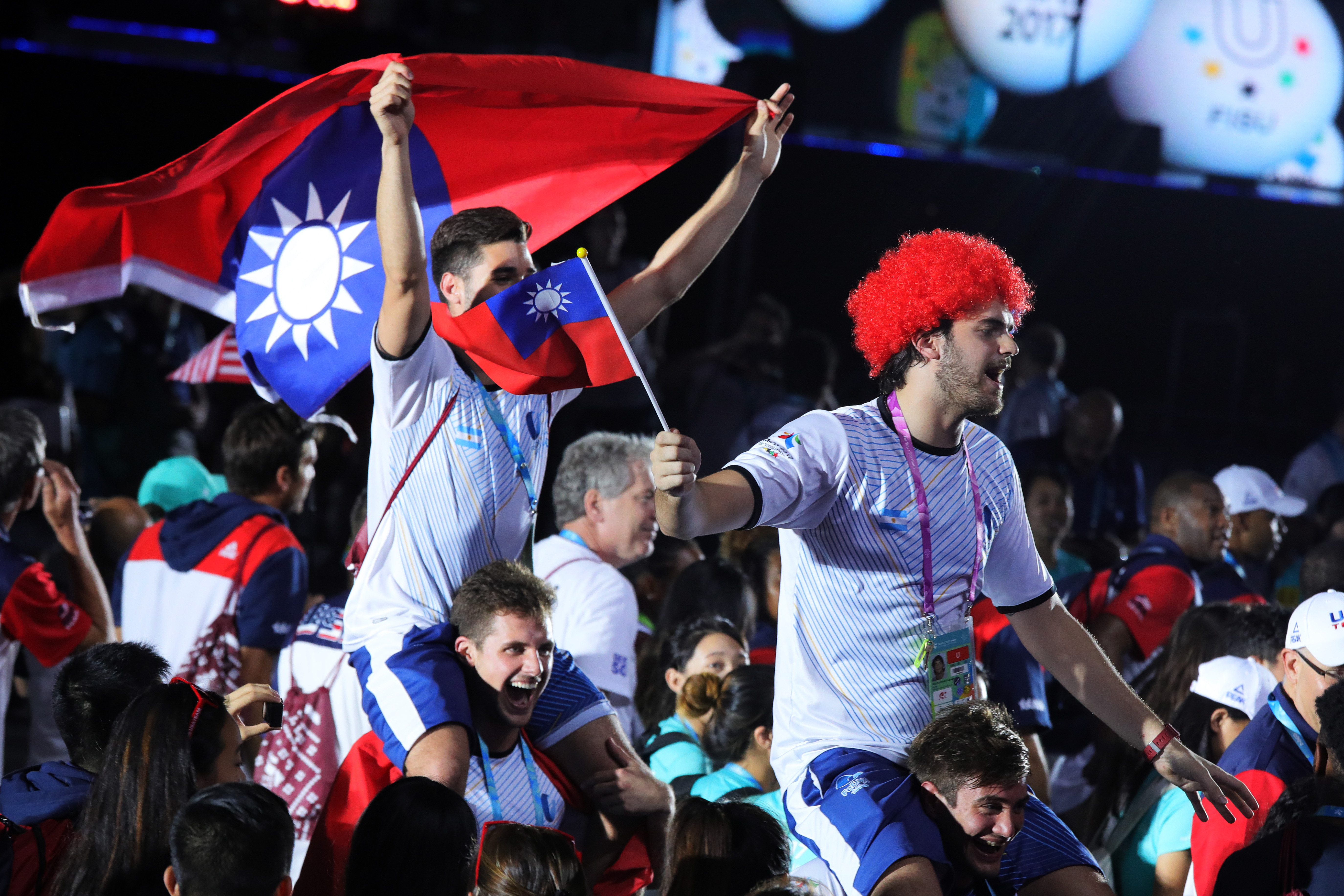 授權方式及範圍：中華民國總統府│政府網站資料開放宣告 Authorization Method & Scope: Office of the President, Republic of China (Taiwan) | Government Website Open Information Announcement